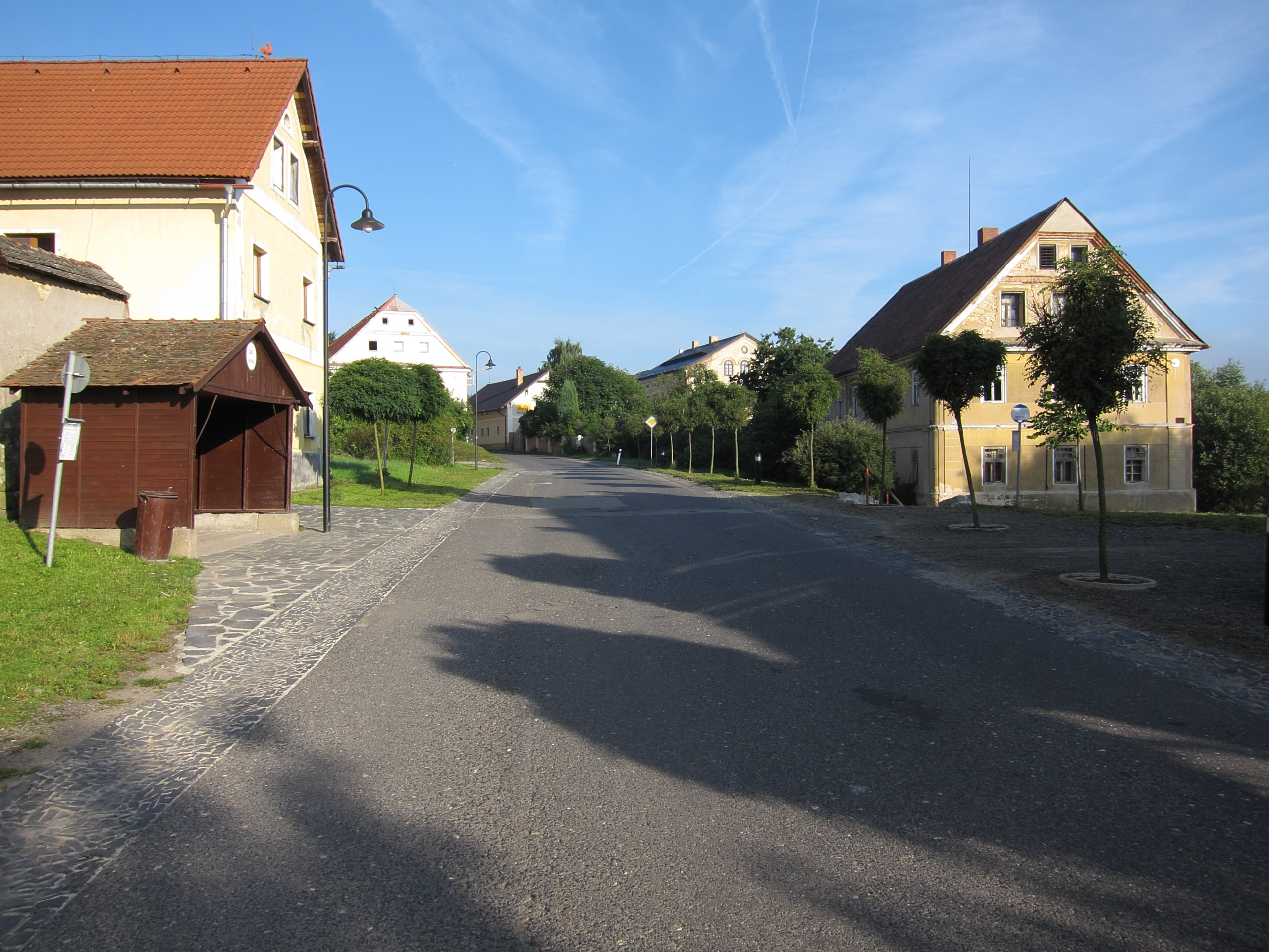 Česky: Dřevčice